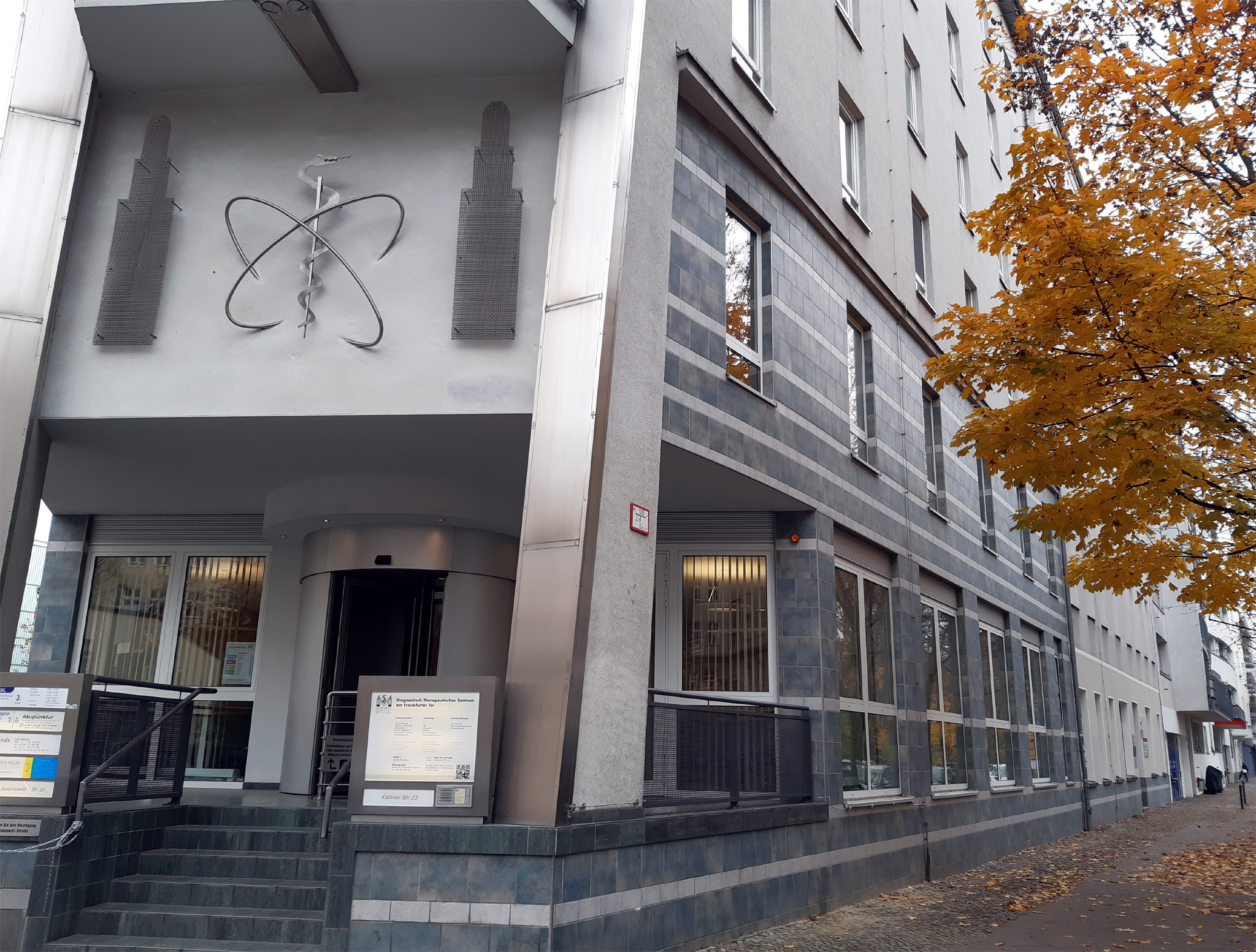 Eckeingang des Diagnostisch-Therapeutischen Zentrums (DTZ Berlin) in der Kadiner Straße 23, Berlin-Friedrichshain mit dem Logo des DTZ Berlin über dem Eingang - Äskulapstab mit Atomium flankiert von den beiden Türmen am Frankfurter Tor. „Das DTZ Berlin ist ein nach ISO 9001 und GMP zertifiziertes medizinisches Versorgungszentrum mit schwerpunktmäßiger onkologischer Ausrichtung. Die Einrichtung verfügt über vier Fachbereiche, die eng miteinander verzahnt und technisch auf höchstem Niveau ausgestattet sind. Hierzu gehören die beiden diagnostischen Zentren für Nuklearmedizin und Radiologie sowie die beiden therapeutischen Zentren für Interventionelle Onkologie & Radionuklidtherapie sowie für Strahlentherapie.“ (Selbstdarstellung auf der Homepage des DTZ Berlin)